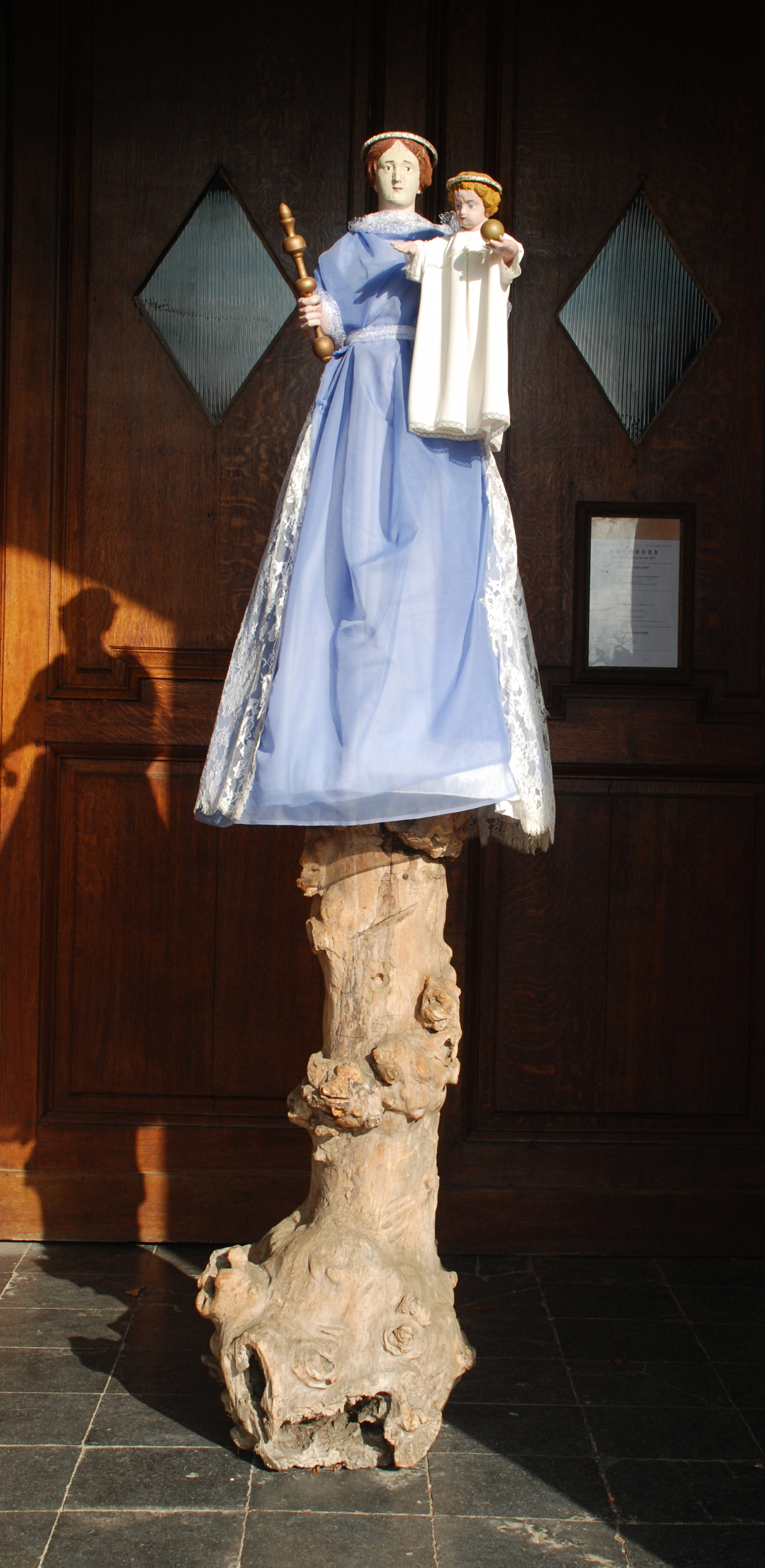 Belgique - Brabant wallon - Court-Saint-Étienne - Église Saint-Étienne - la Vierge en 2017